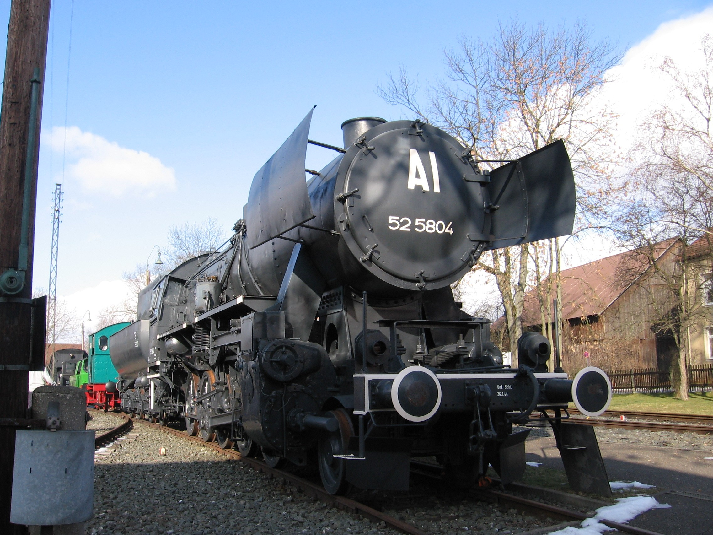 Kriegslokomotive der Baureihe 52 der Deutschen Reichsbahn mit grauem Anstrich.